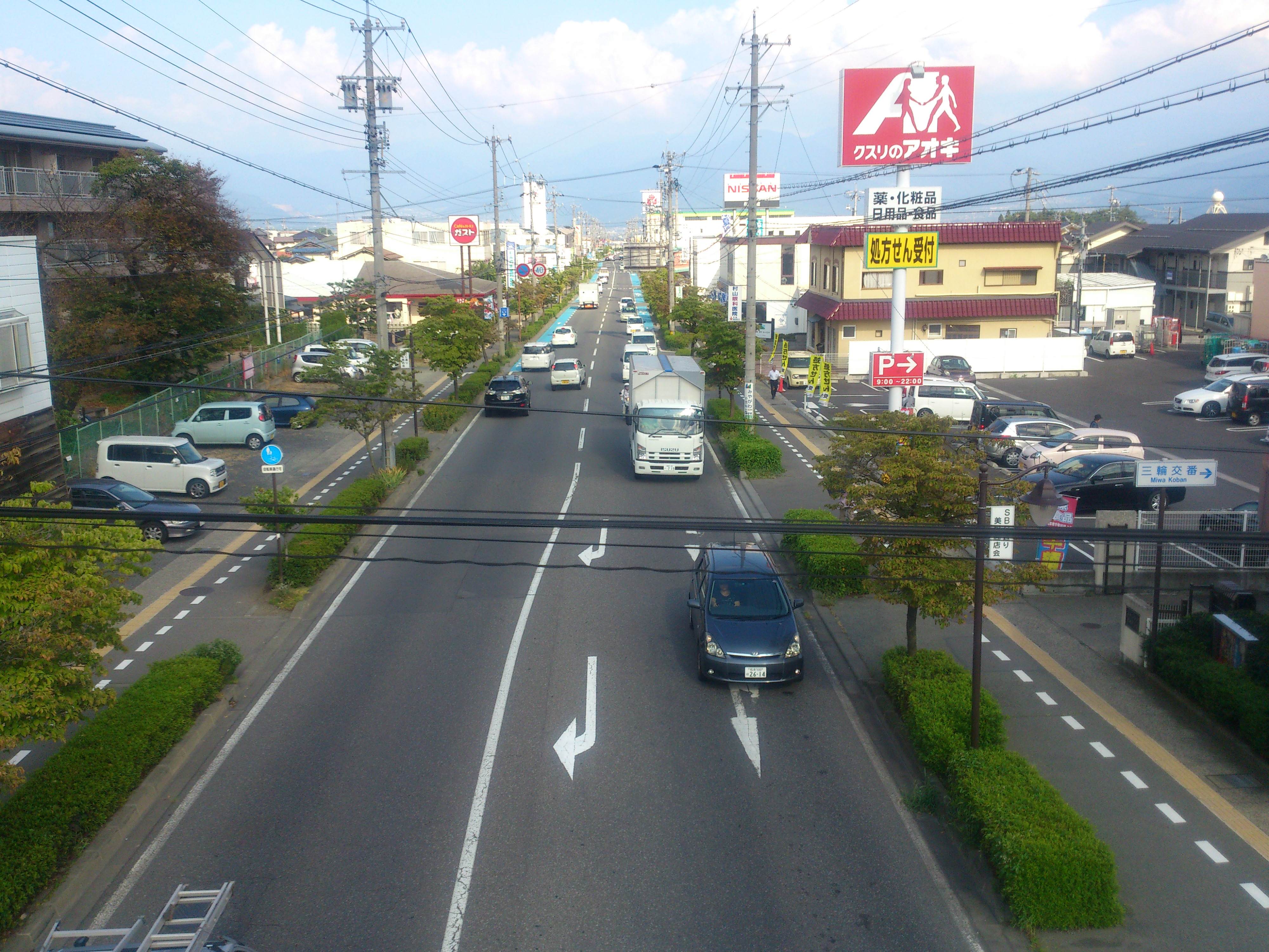 SBC通り・吉田方面（長野県長野市三輪十丁目）